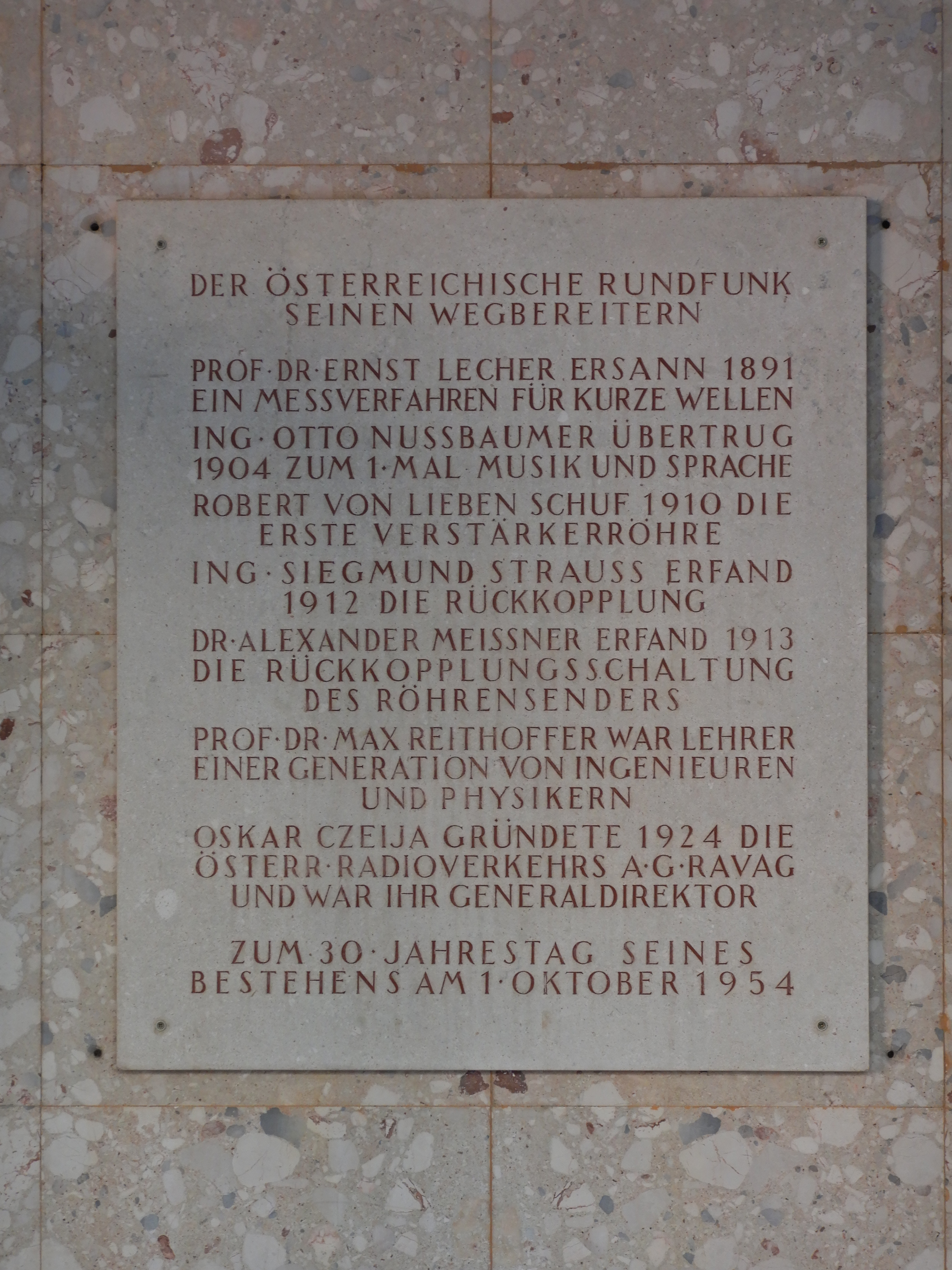 Gedenktafel für Rundfunkpioniere (Wien, Argentinierstraße 30)